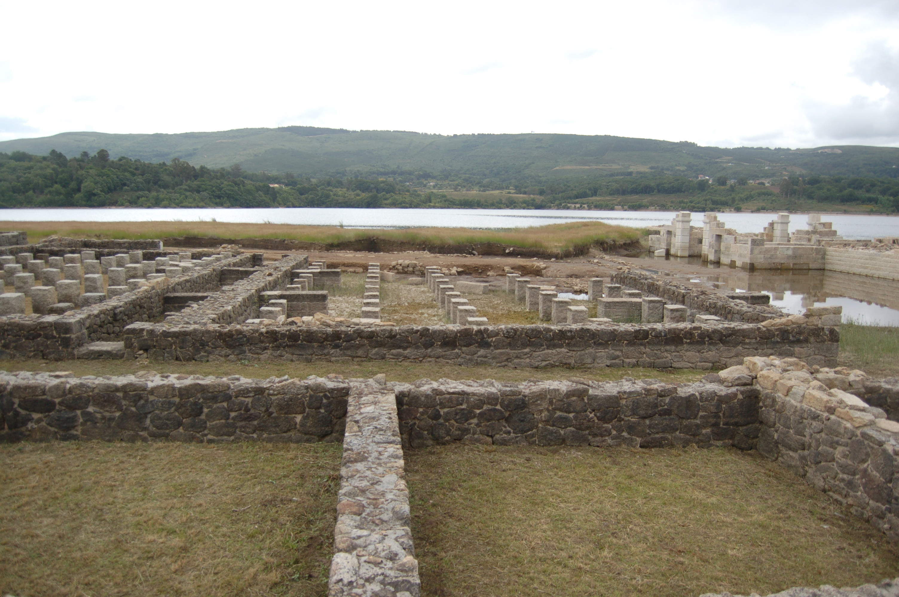 restos da zona dos hórreos de Aquis Querquennis Categoría:Imaxes de Bande